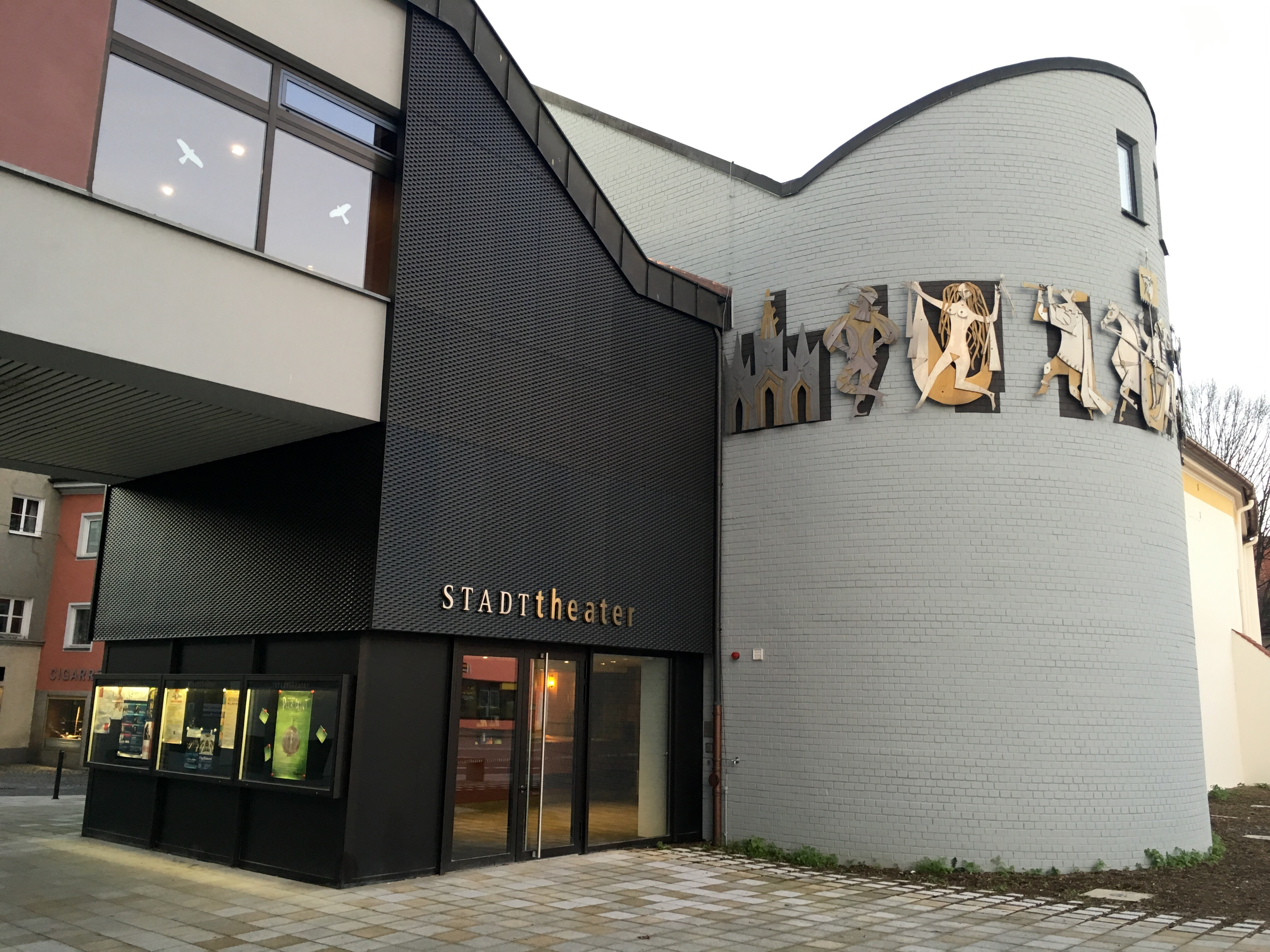 Der Haupteingang des Stadttheaters nach der Renovierung 2015.